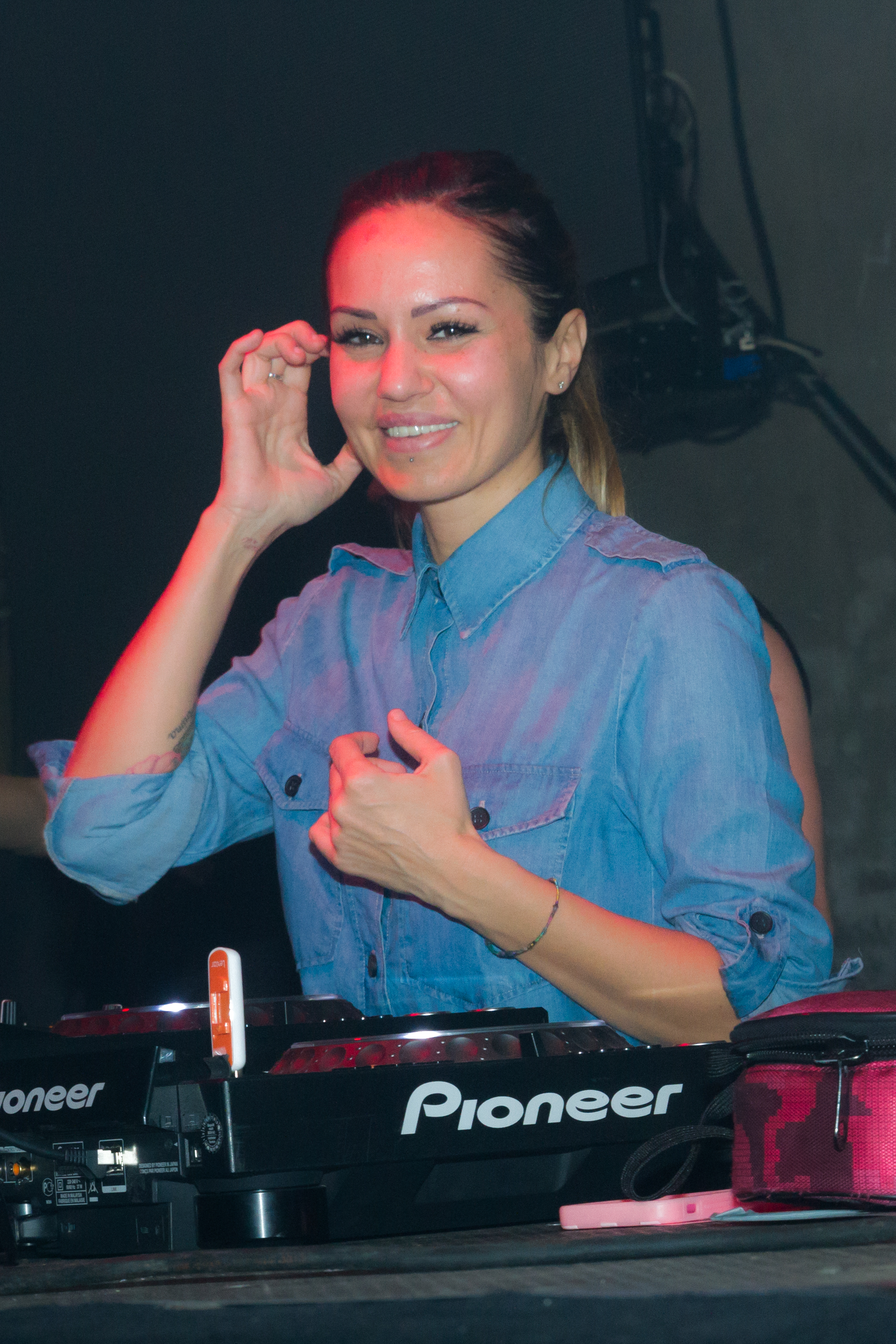 Deborah De Luca beim Steine und Bass Festival im Berliner E-Werk.